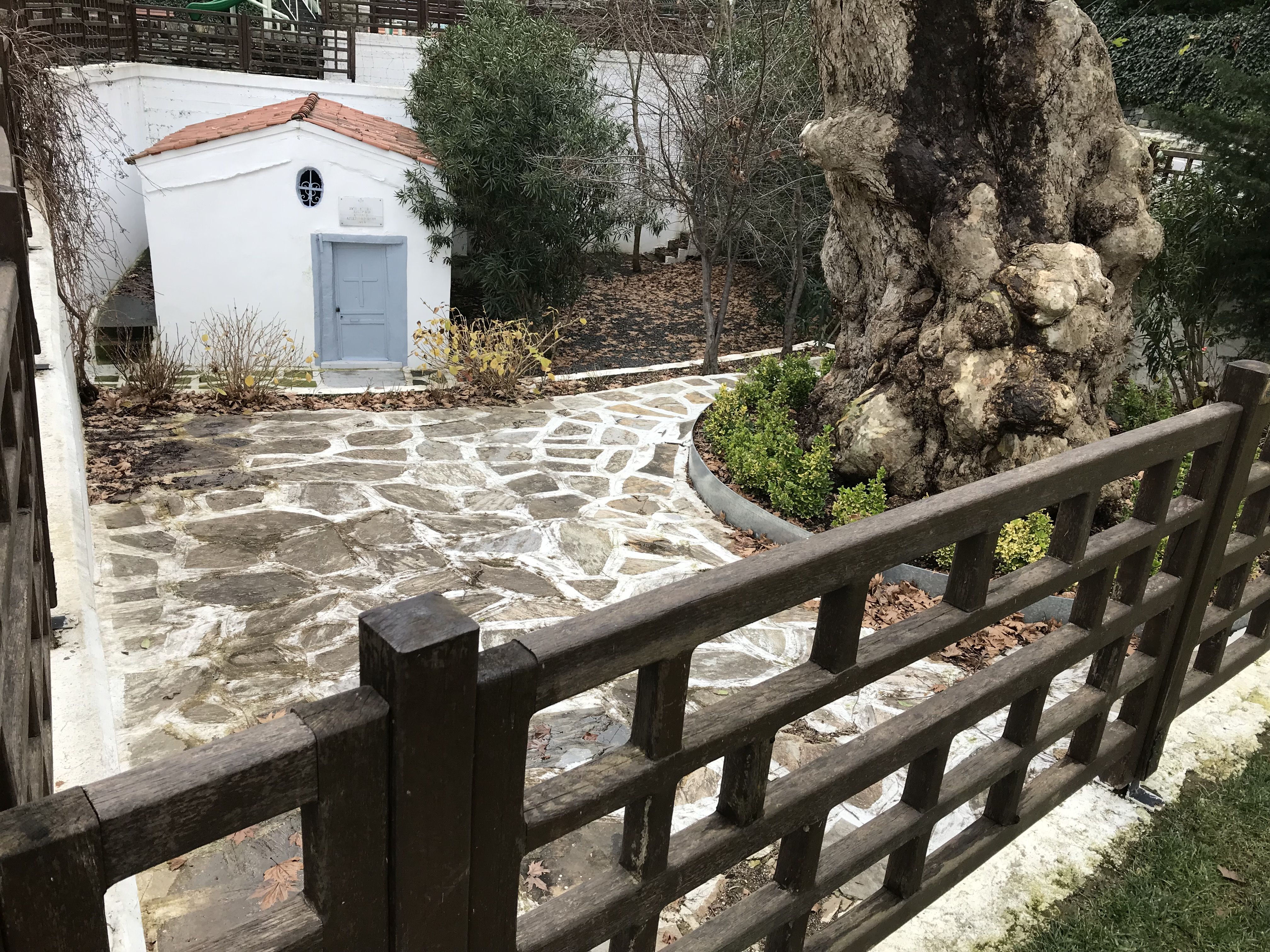 Atsushi Miyazaki Parkı'nda içinde kalan Ayia Kiriaki Ayazması ve çınar ağacı.